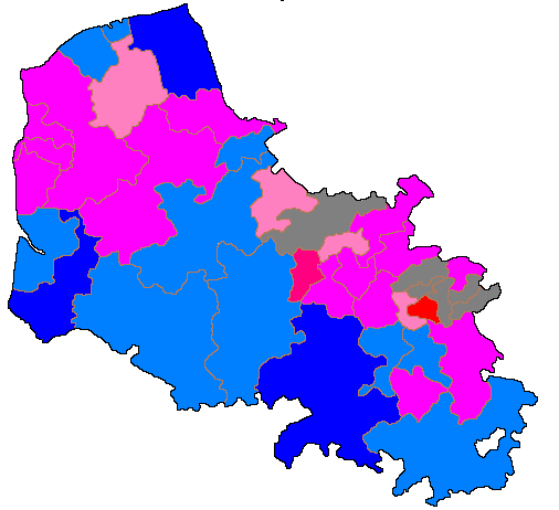 Résultat des élections départementales 2015 dans le Pas-de-Calais